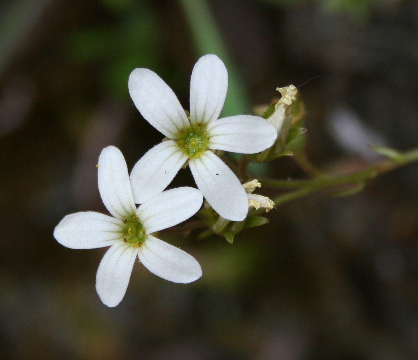 Saxifraga carpetana subsp. graeca, Steinbrechgewächse (Saxifragaceae) - Italien/Italia/Italy: Kalabrien/Calabria, Prov. Reggio Calabria, Parco Nazionale dell'Aspromonte, Vallata dell'Amendolea E Diga del Menta